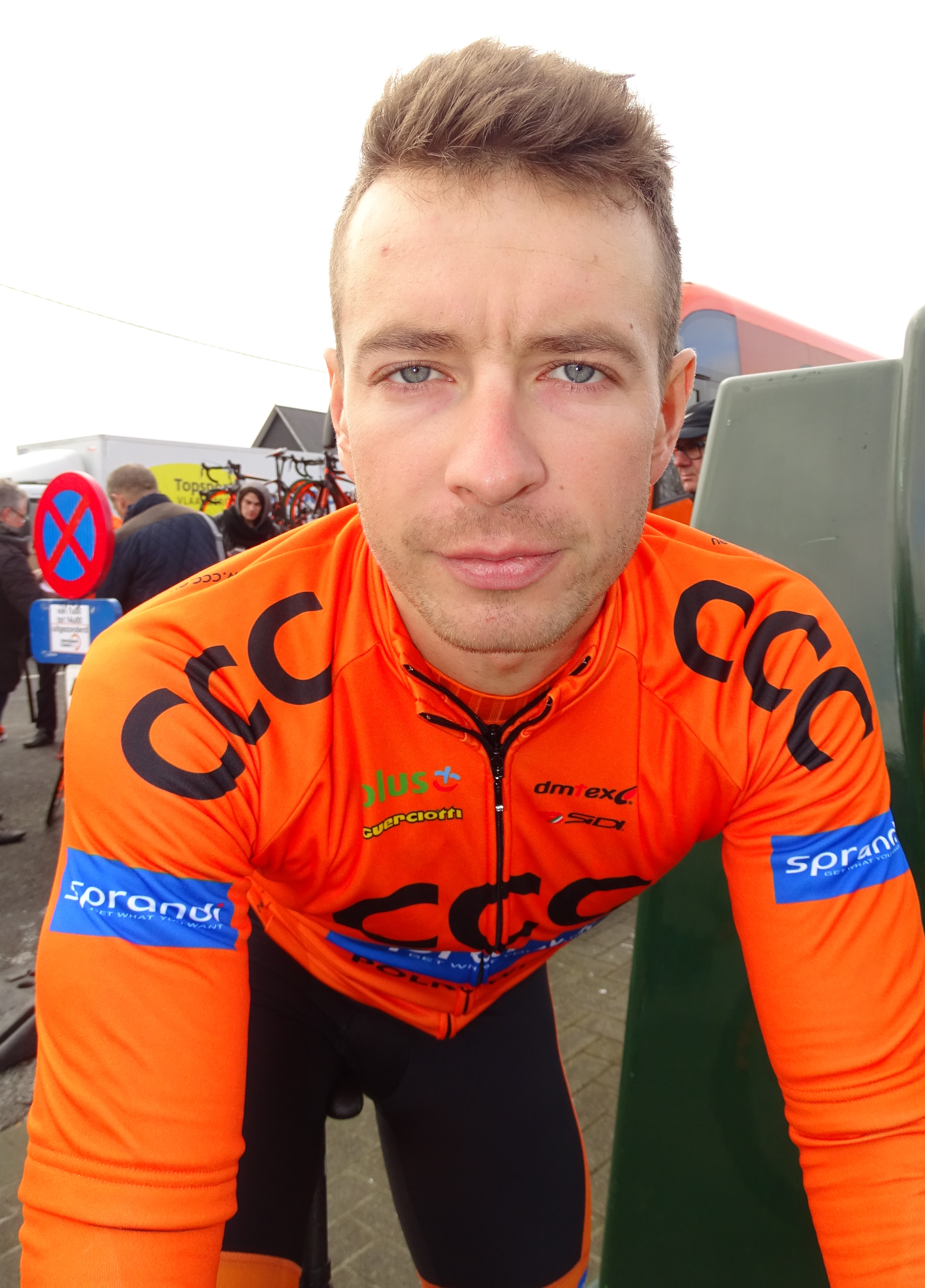 Reportage réalisé le vendredi 18 mars à l'occasion du départ de la Handzame Classic 2016 à Bredene, Belgique.